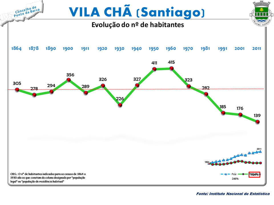 Censos 1864/2011